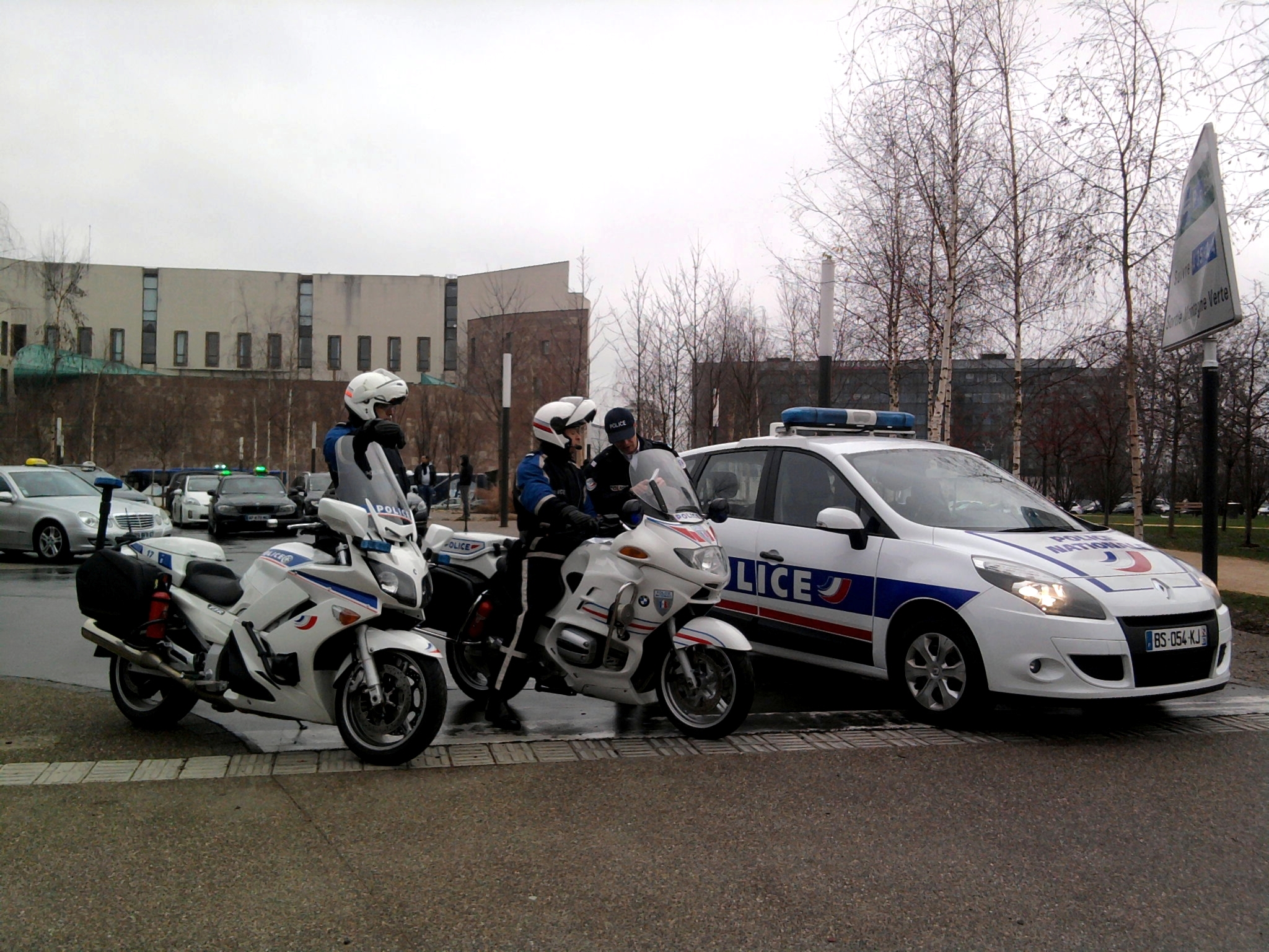 Manifestation des taxis le 10 janvier 2013, parc de l'Etoile à Strasbourg